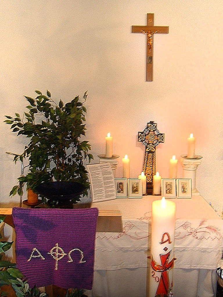 Altar der keltischen Kirche in Deutschland